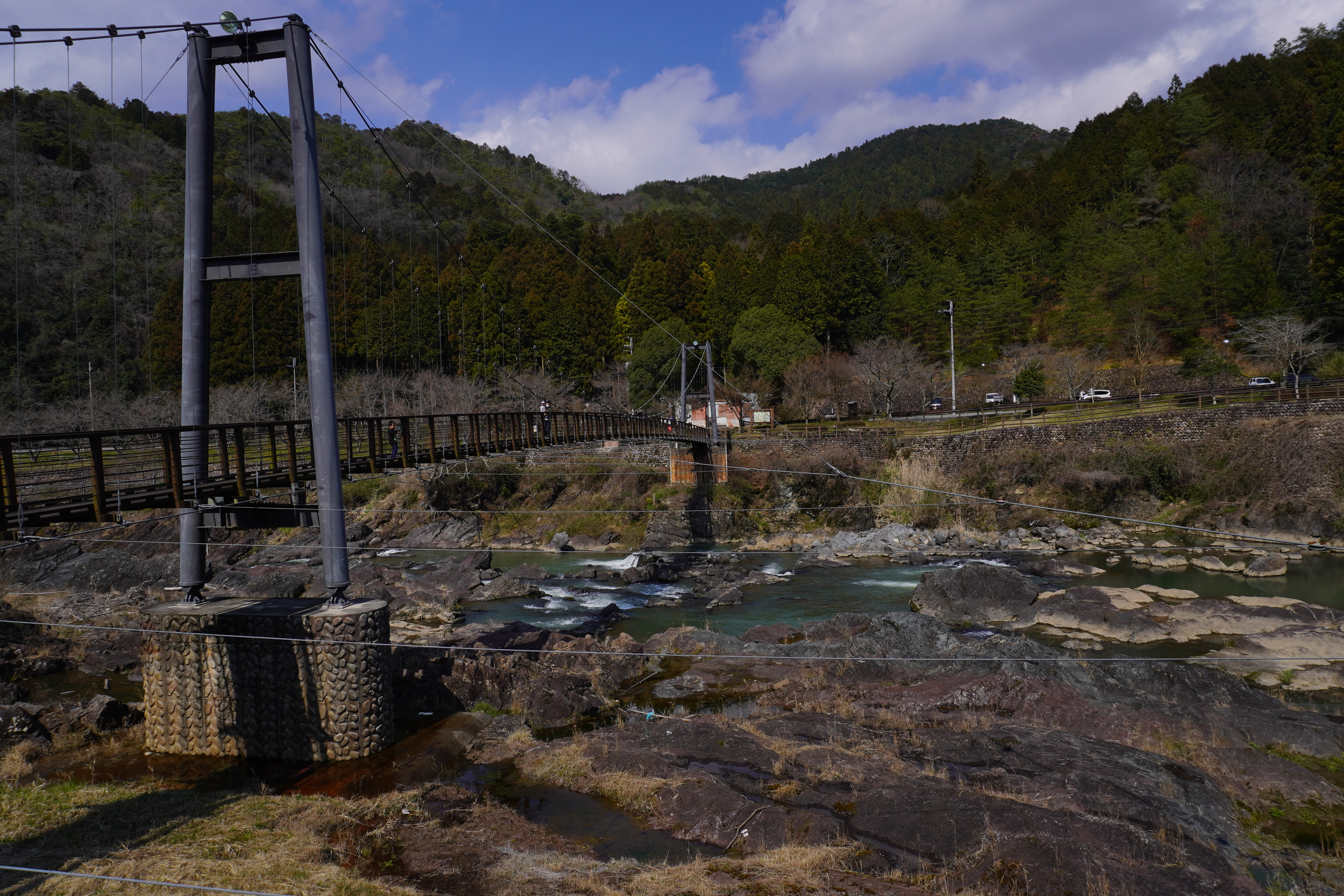 吊り橋と駐車場